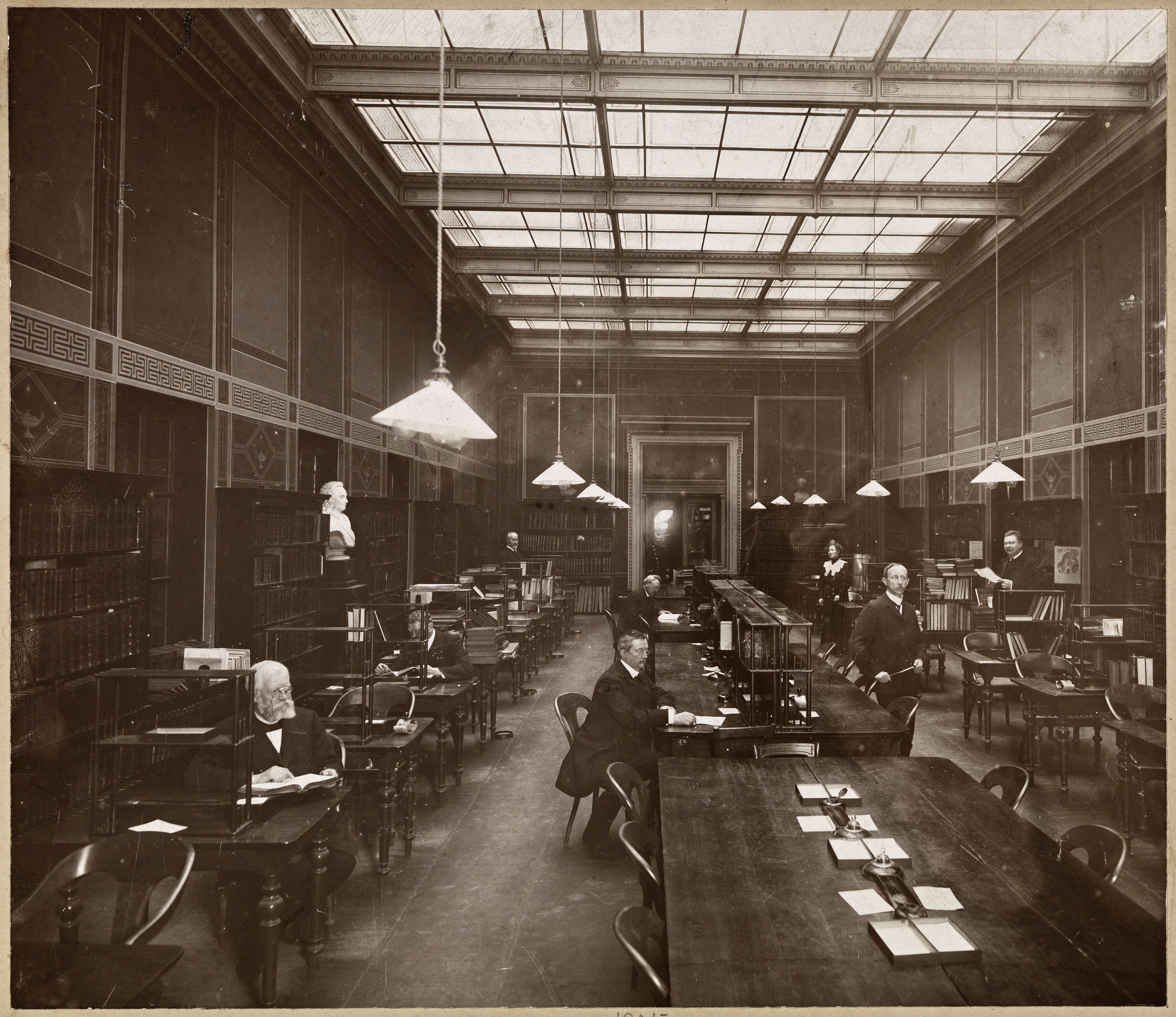 Beskrivelse / Description: I årene 1851–1913 holdt Universitetsbiblioteket til i den ene av universitetsbygningene ved Karl Johans gate (Domus Bibliotheca). Dato / Date: 1905 Sted / Place: Oslo, Karl Johans gate Fotograf / Photographer: ukjent / unknown Digital kopi av original / Digital copy of original: s/h papirpositiv Eier / Owner Institution: Nasjonalbiblioteket / National Library of Norway Lenke / Link: Bildesignatur / Image Number: blds_02803